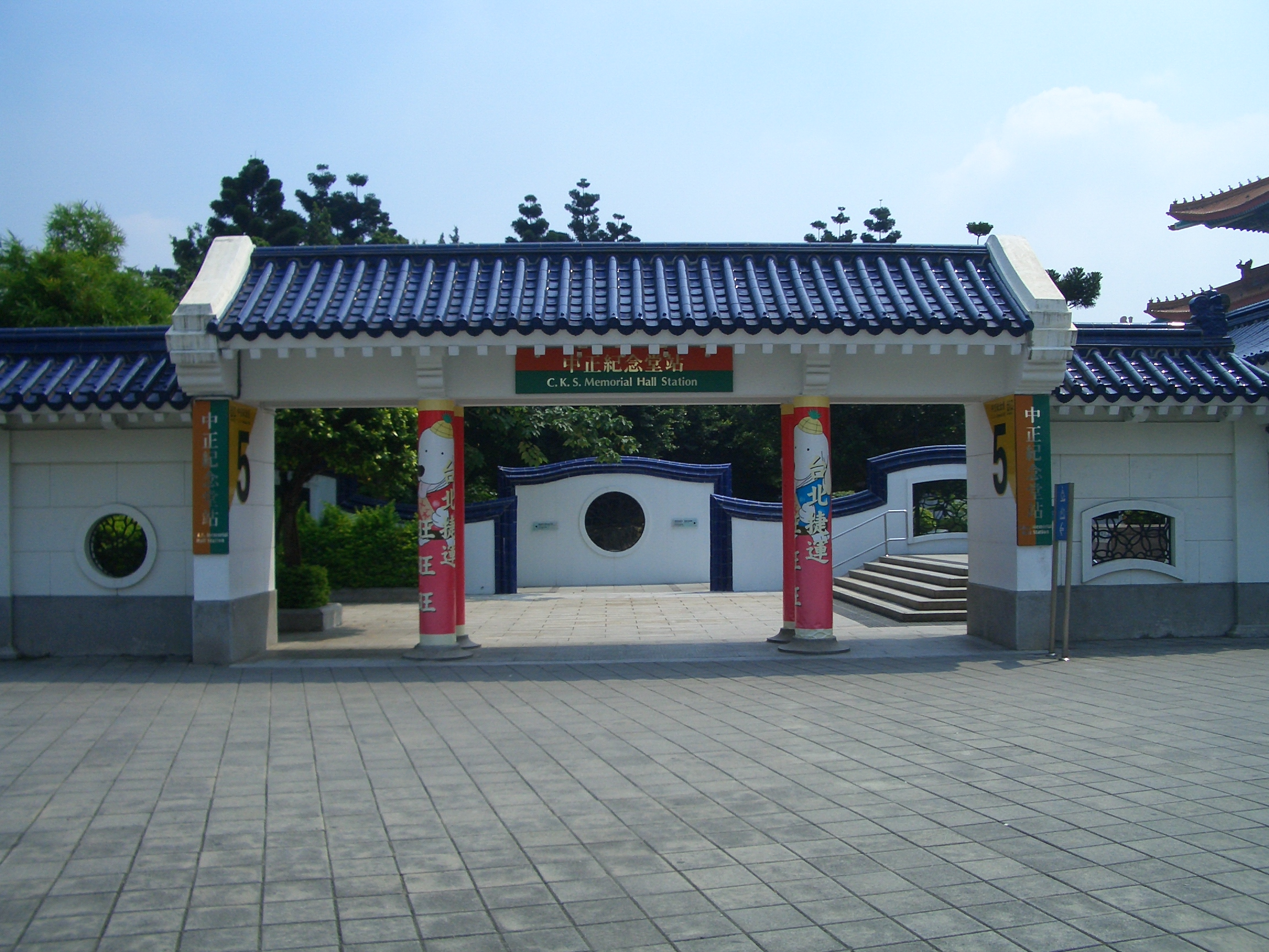 中華民國臺灣台北市台北捷運中正紀念堂站5號出口。